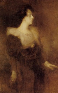 Ritratto di Pauline Ménard-Dorian (1870-1941) olio su tela, 126 x 81 cm